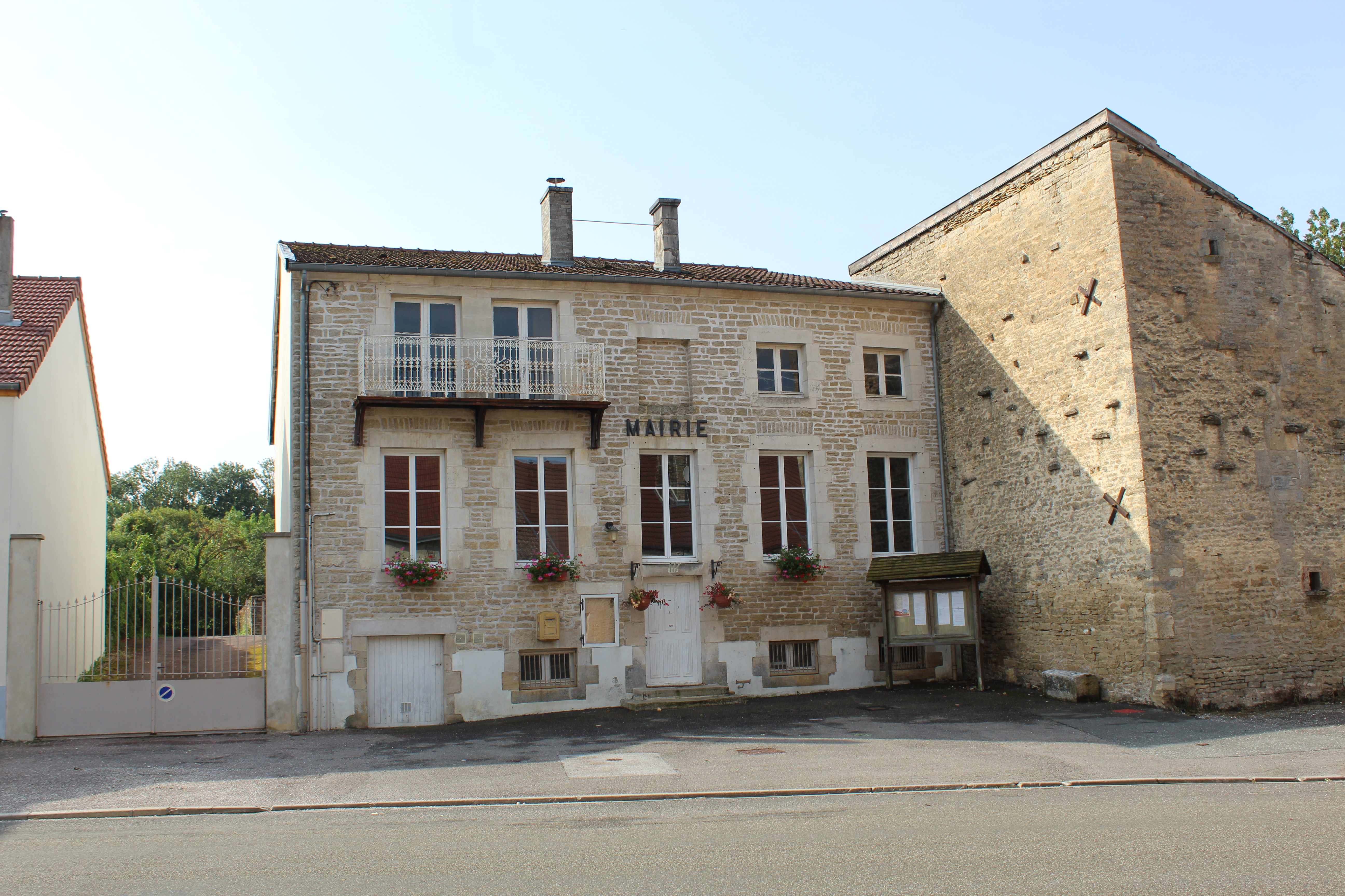 La mairie annexe de Marault.